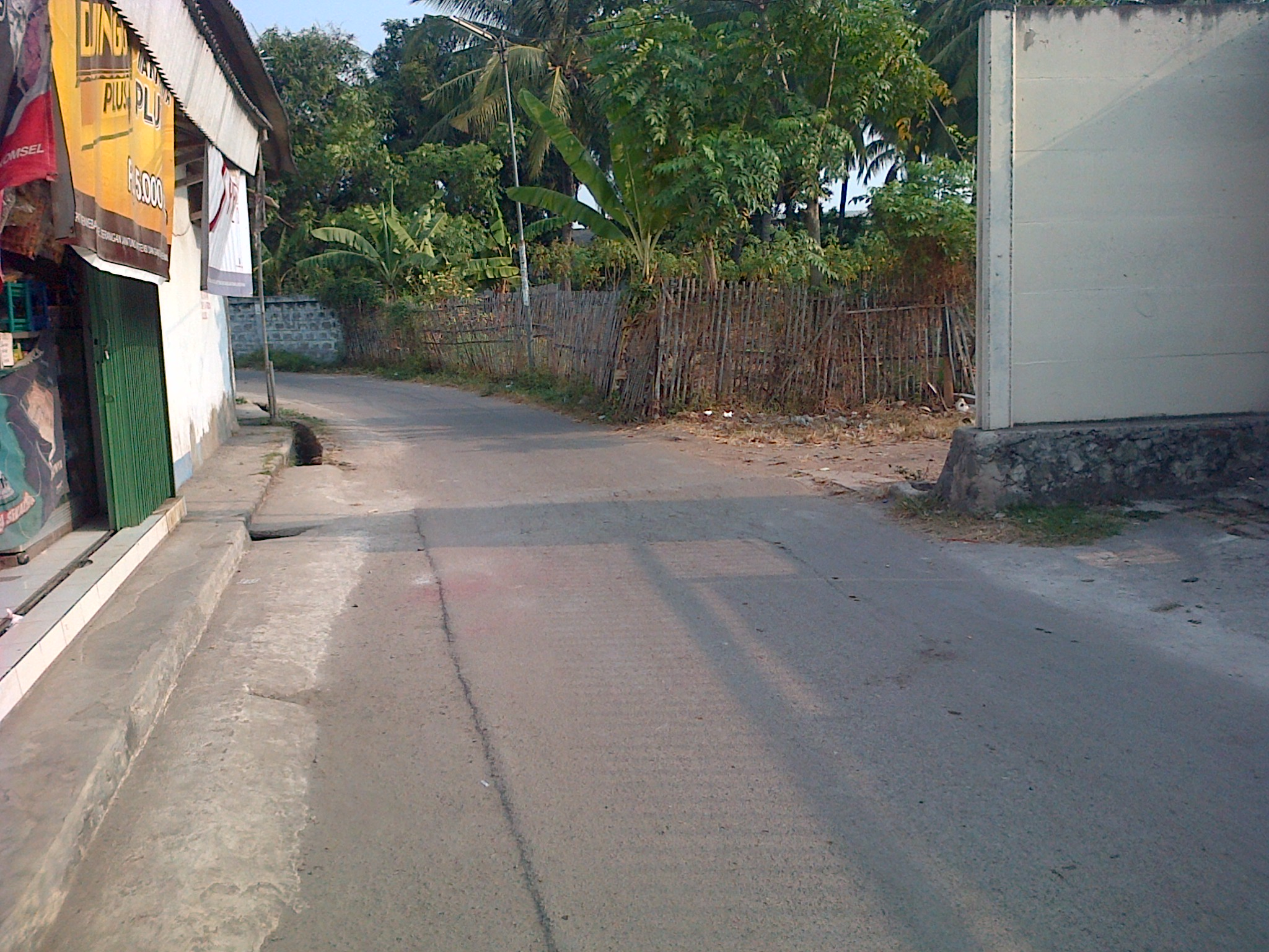 Jl. Perkutut V Neglasari, Batu Ceper, Tangerang